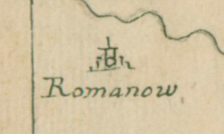 Беларуская (тарашкевіца): Раманаў (Ramanaŭ) на падрабязнай мапе ваколіцаў Амсьціслава